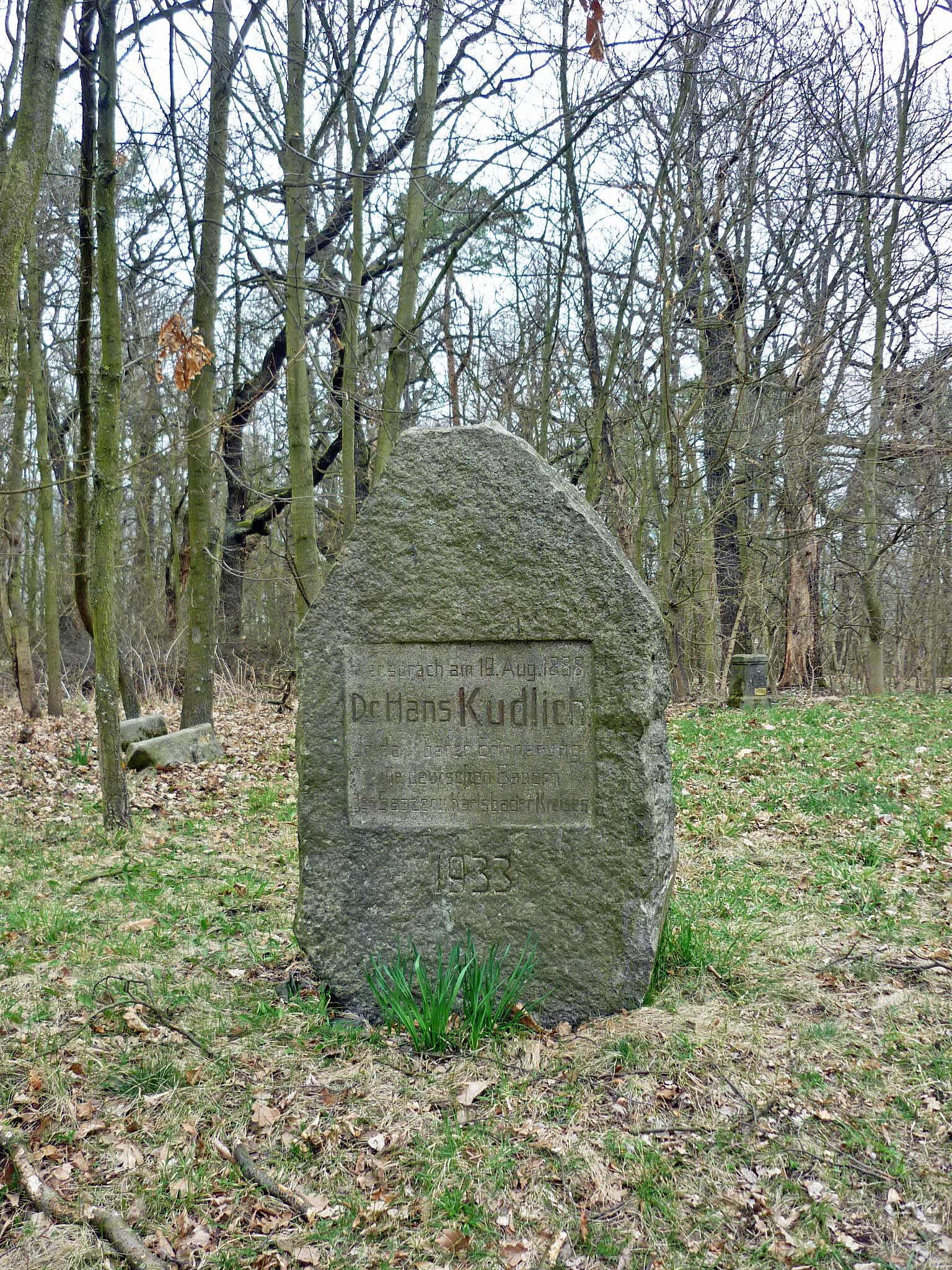 Widmungsstein für Hans Kudlich aus dem Jahr 1933, seit 2003 auf dem Winteritzer Kapellenberg, urspr. auf dem Legerberg im Duppauer Gebirge: „Hier sprach am 19. Aug. 1888 Dr. Hans Kudlich In dankbarer Erinnerung die deutschen Bauern des Saazer und Karlsbader Kreises.“